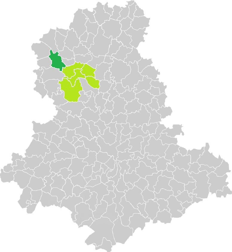 Carte de situation de la commune de Saint-Bonnet-de-Bellac (en vert foncé) dans le votre Canton (en vert clair) sur une carte des communes de la Haute-Vienne